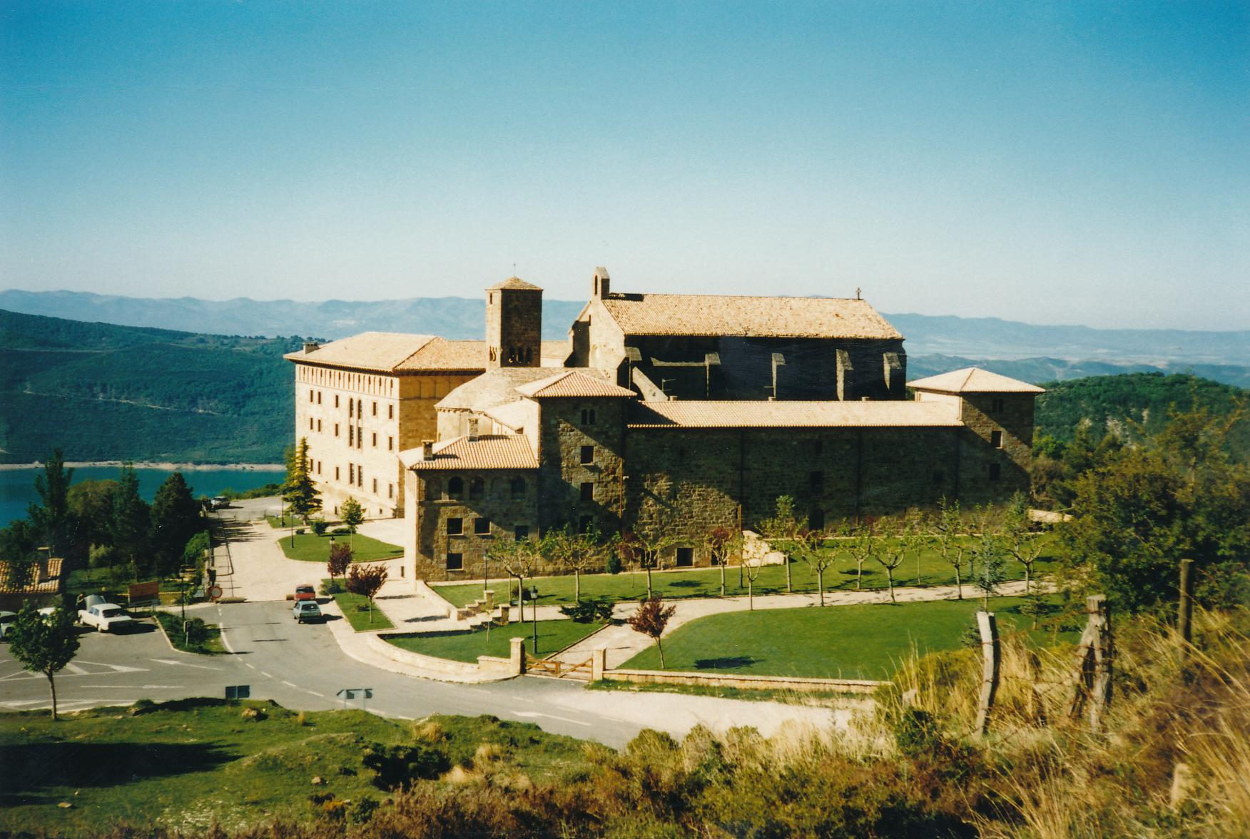 Kloster San Salvador de Leyre Datum: 06/1989 Urheber: Michael Pfeiffer Quelle: Privates Fotoalbum des Urhebers